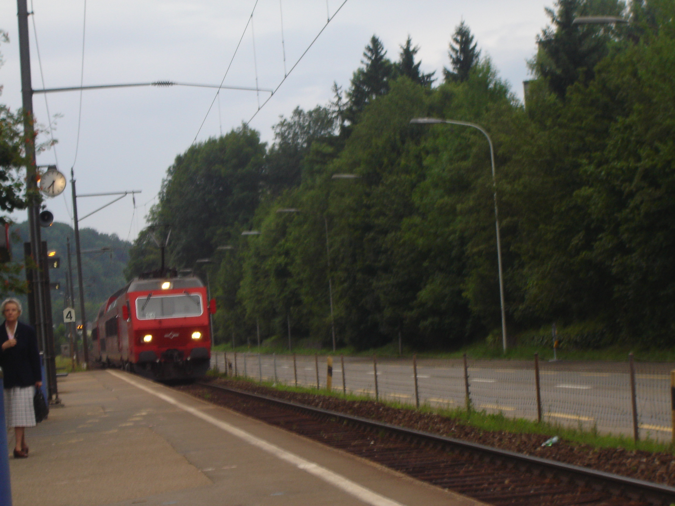 Sihltalbahn